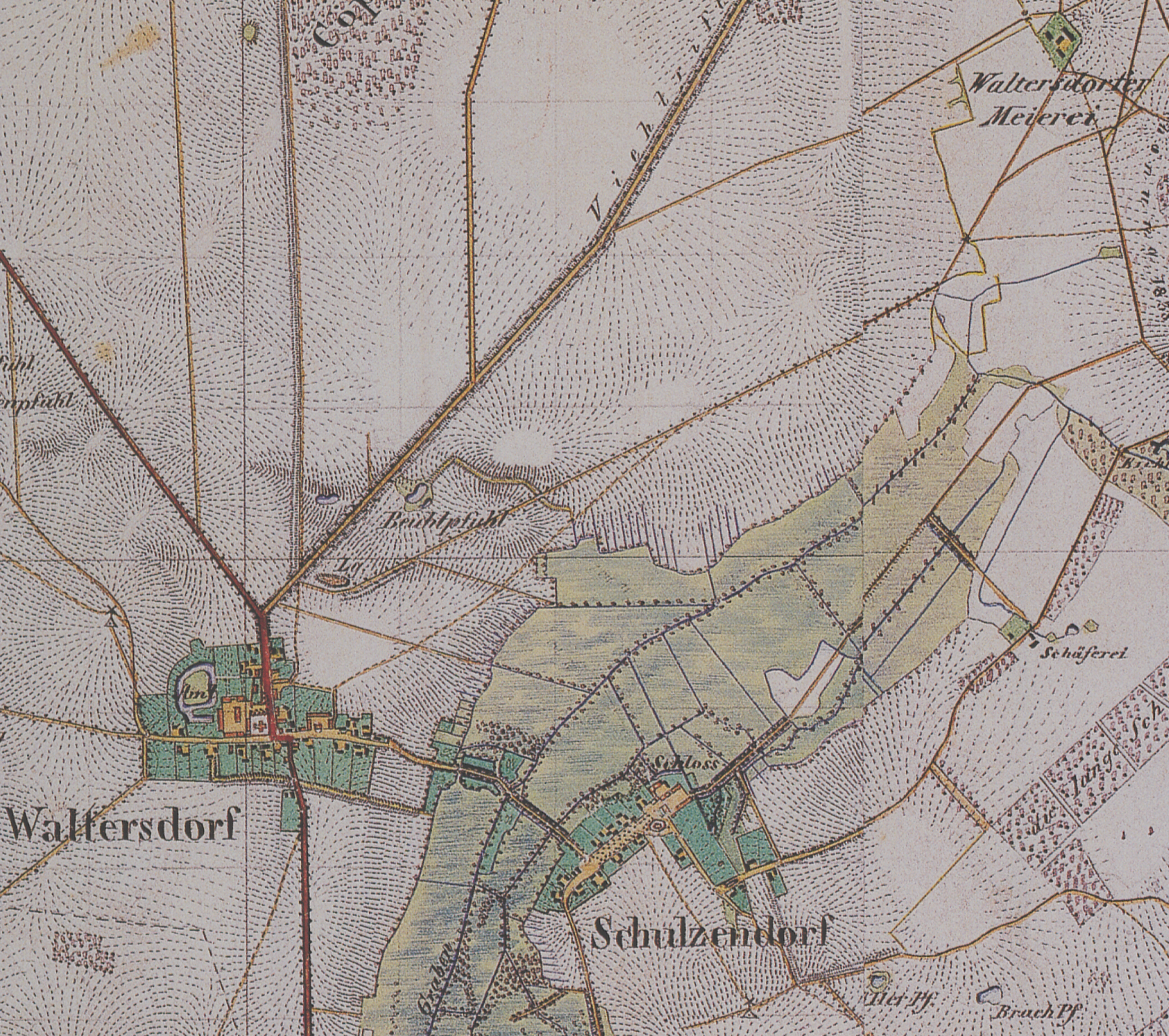 Waltersdorf und Schulzendorf, Landkreis Dahme-Spreewald, Branndenburg, Ausschnitt aus dem Urmesstischblatt von 1839